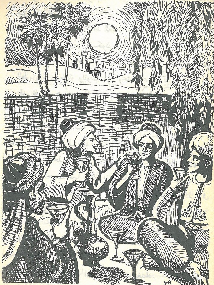 أبو نوَّاس وبعض أصحابه يتسامرون على ضفاف النيل بِمصر.